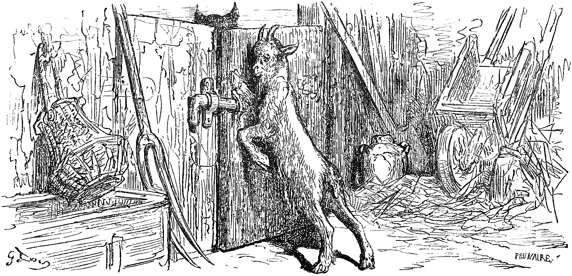 grafika z książki PL Bajki, Jean de La Fontaine, nakładem i drukiem Jana Noskowskiego, Warszawa 1876